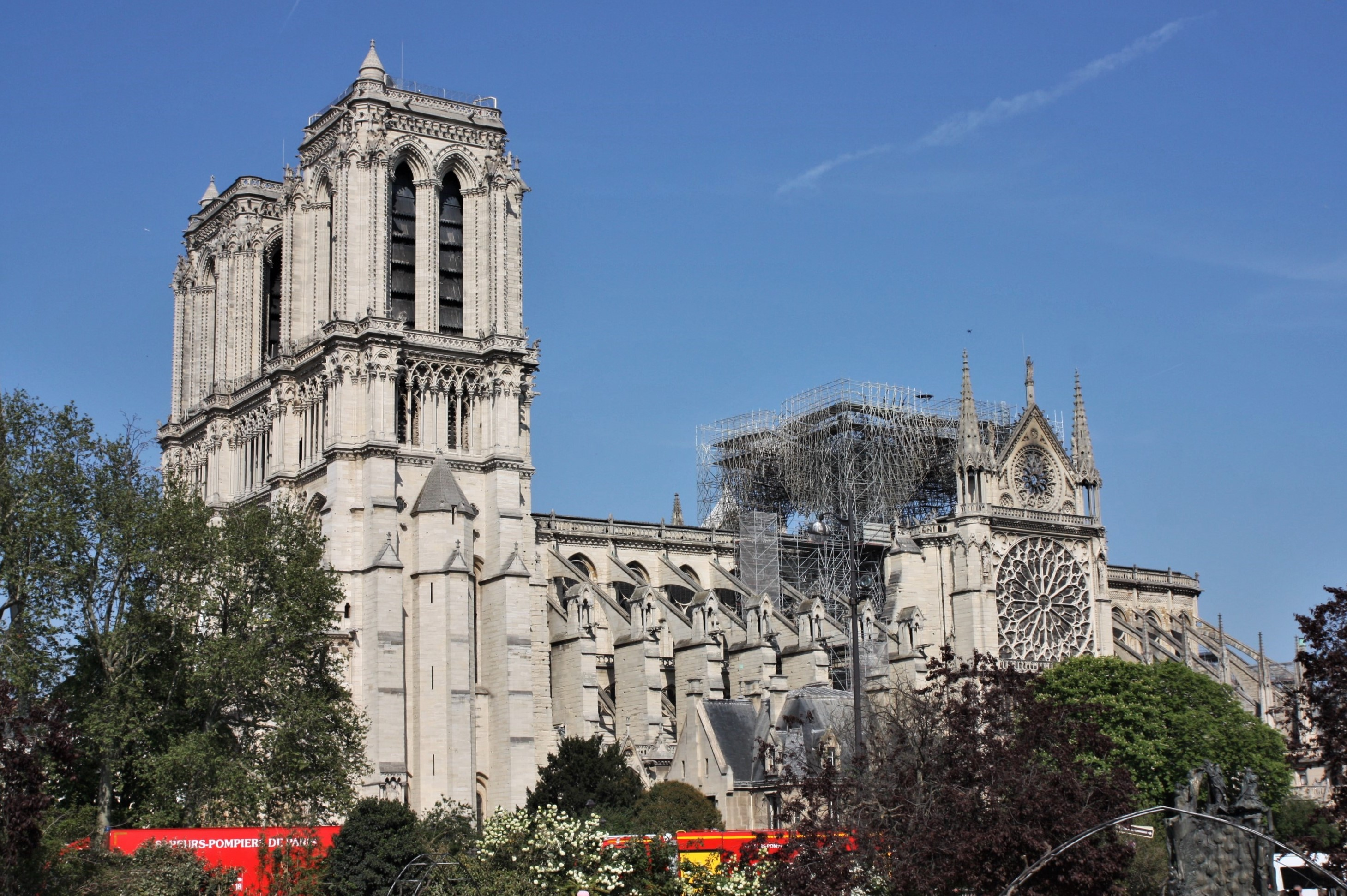 Paris 1er